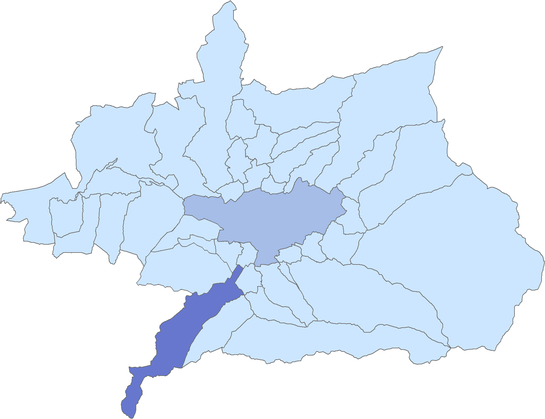 Situación del municipio de Alhendín respecto a la comarca de la Vega de Granada, en España.